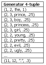 Grammar generator list by Sebastian Nguyen (after Ulf Grenander)